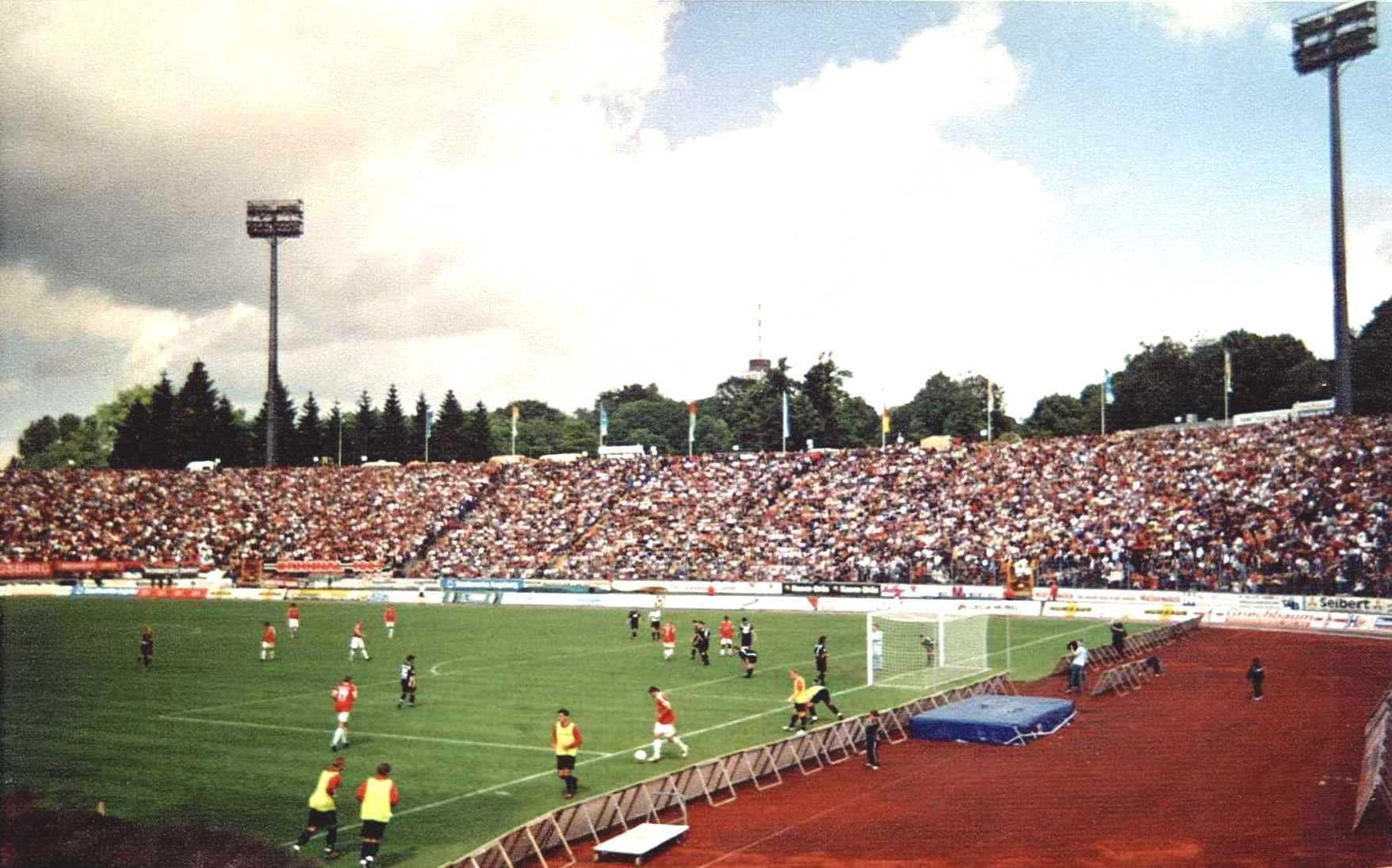 Augsburger Rosenaustadion, Gegentribüne